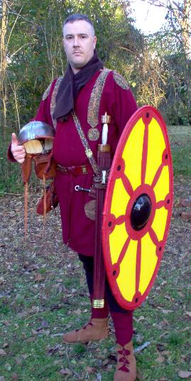 Spätrömischer Soldat der Secundani iuniores, einer Einheit unter dem Kommando des Comes Britanniarum